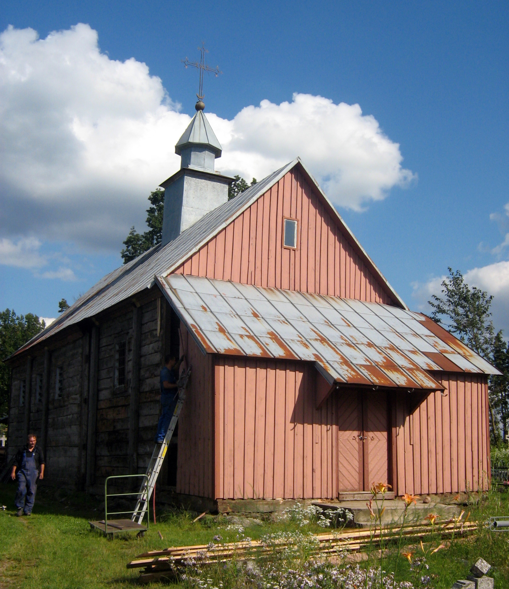 Kaplica cmentarna pw. św. Jerzego w czasie remontu w 2009 roku na cmentarzu w Łosince.